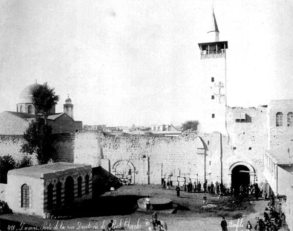 الباب الشرقي لمدينة دمشق ميسون بونفيليس 1880